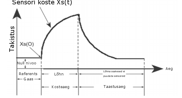 kosteaeg sensoril